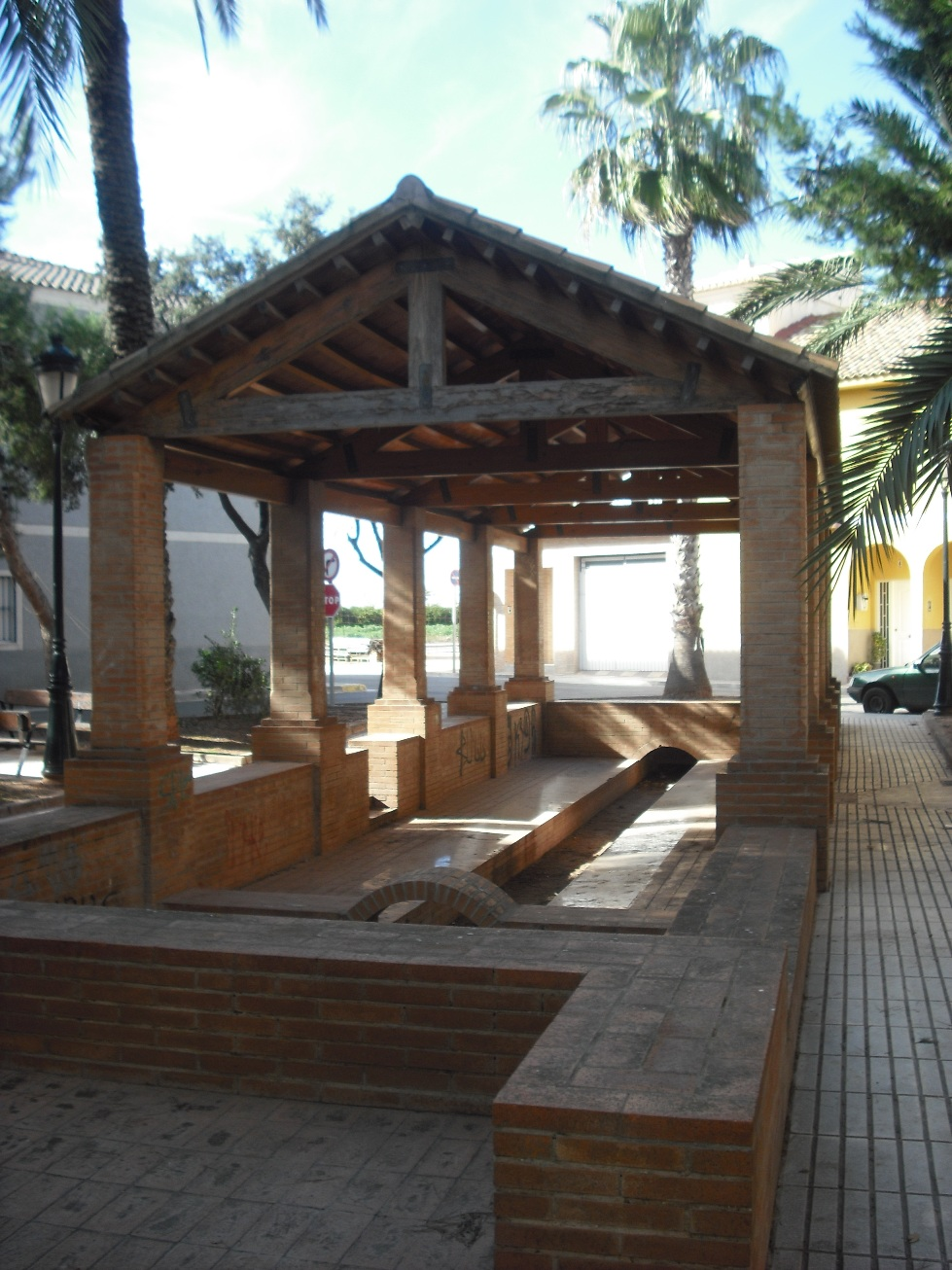 Vista del antiguo lavadero de Albuixech